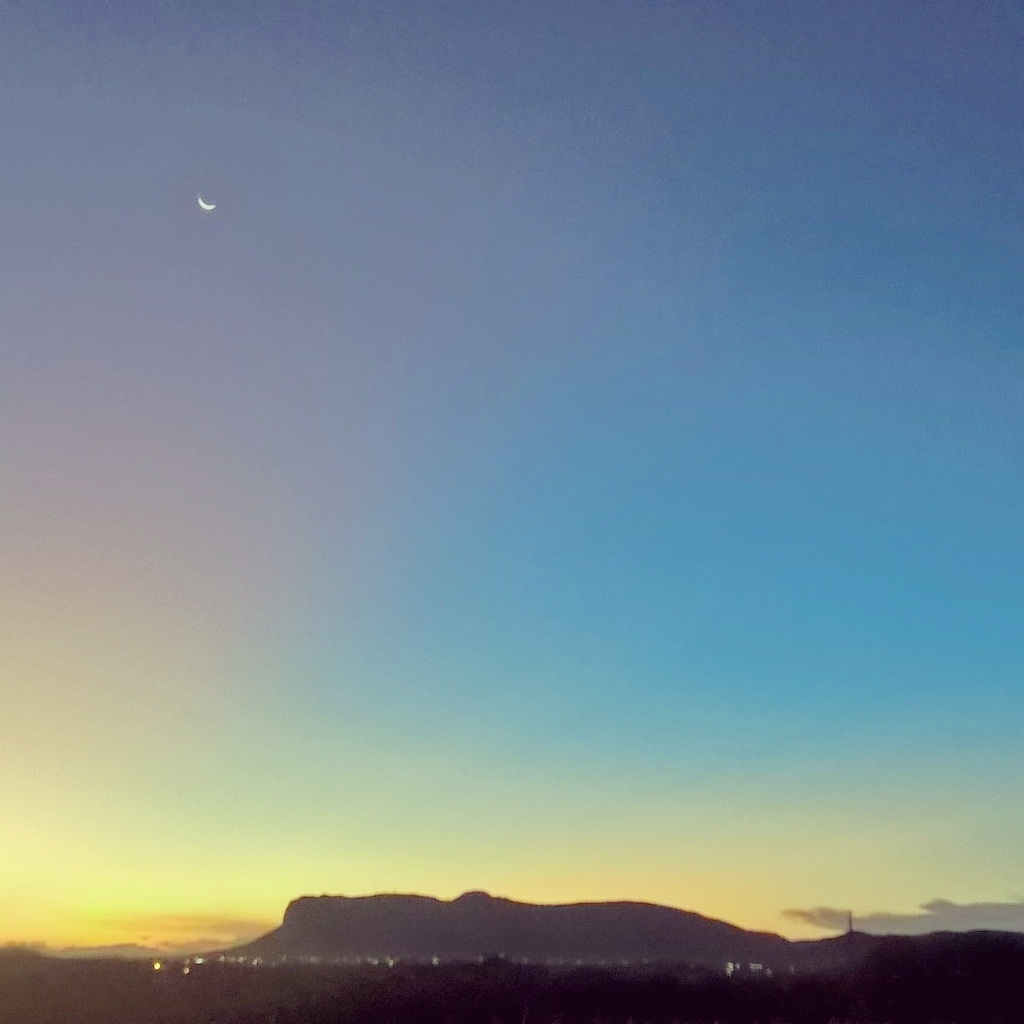 Fotografia registrada por Ana Maris.